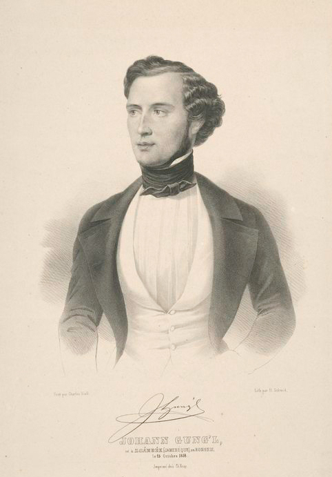 Hungarian violinist, conductor and composer Johann (János) Gungl (1818-1883)